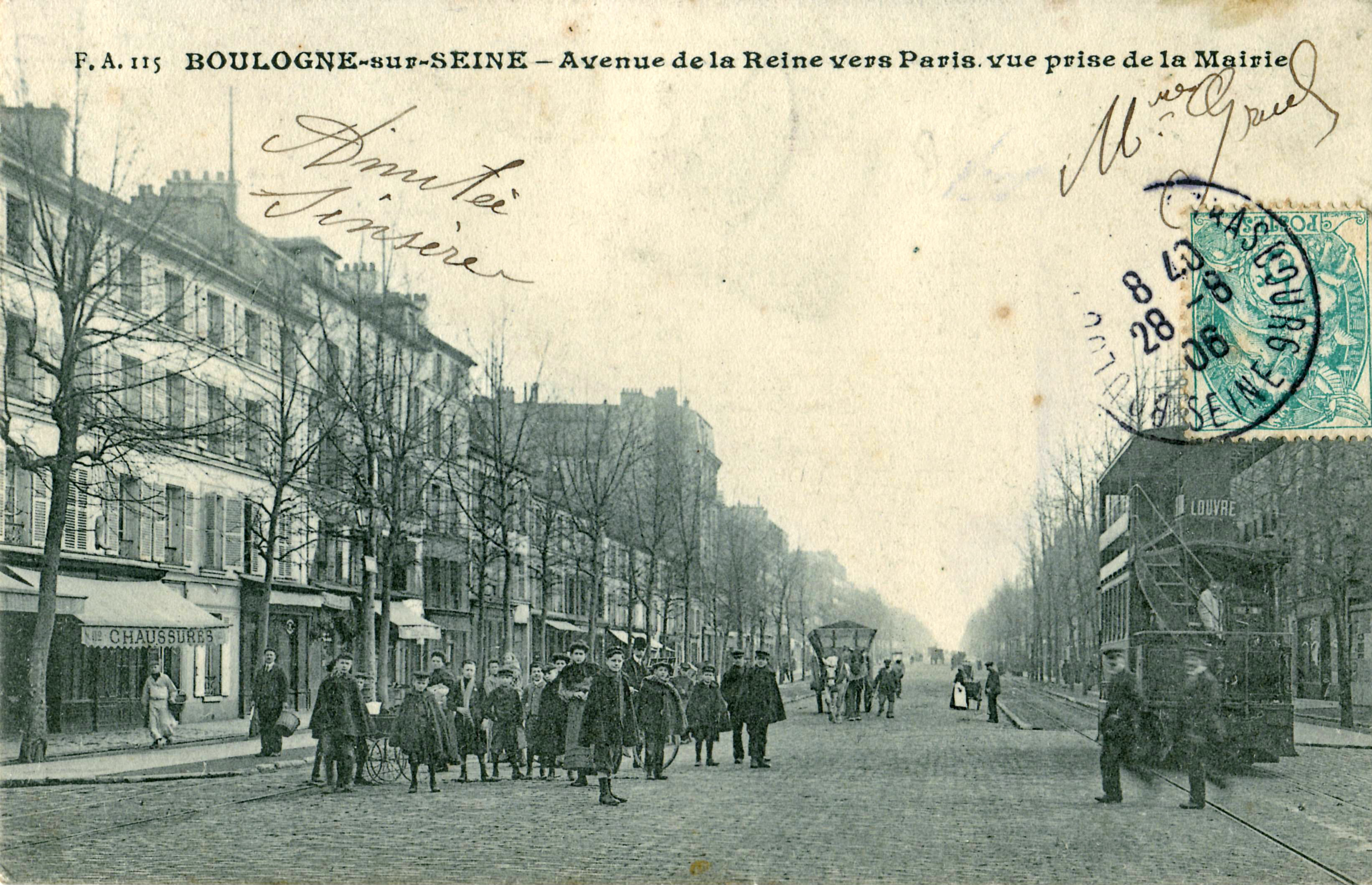 Carte postale ancienne éditée par